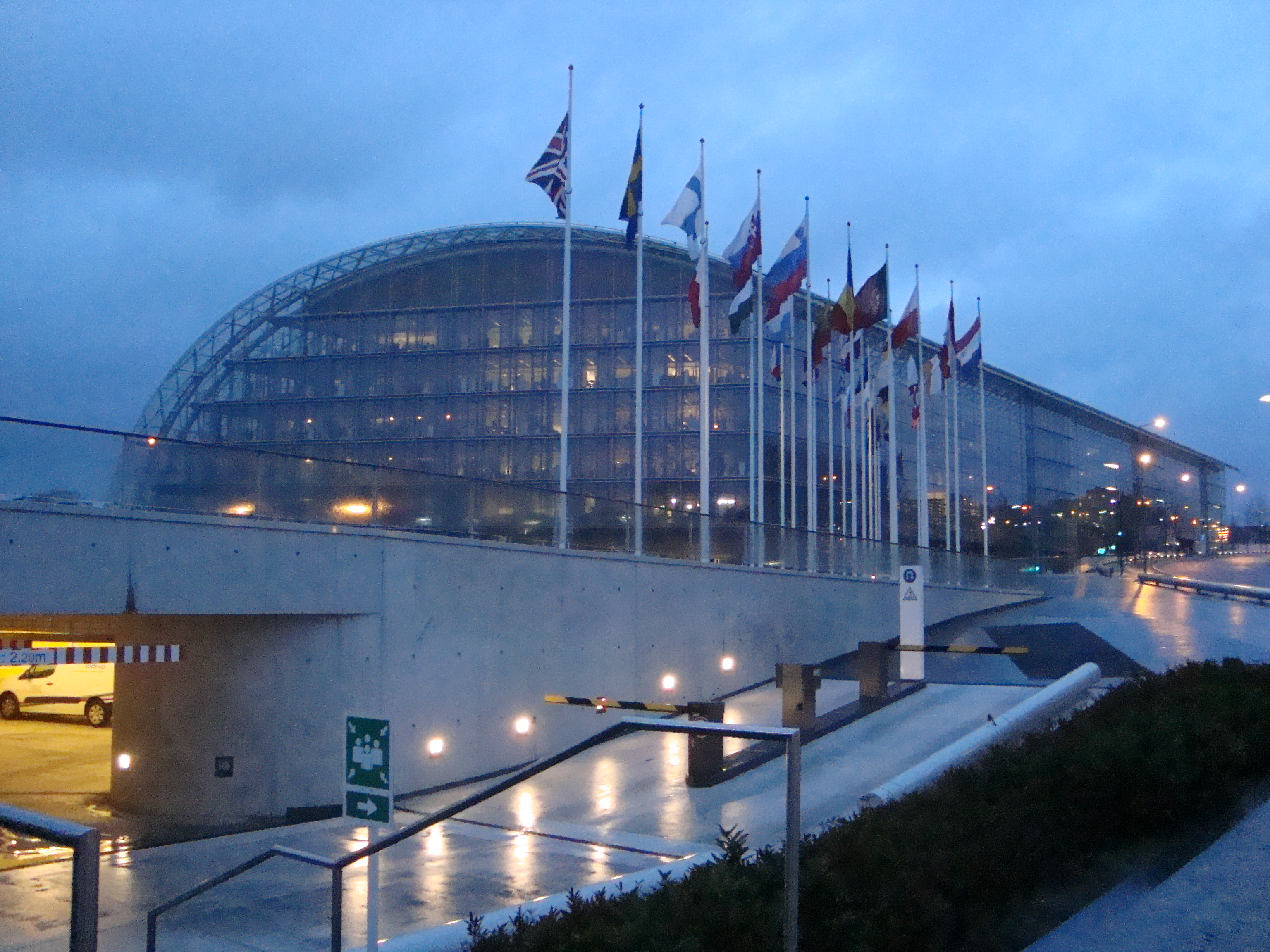 Europäischer Gerichtshof - Luxemburg